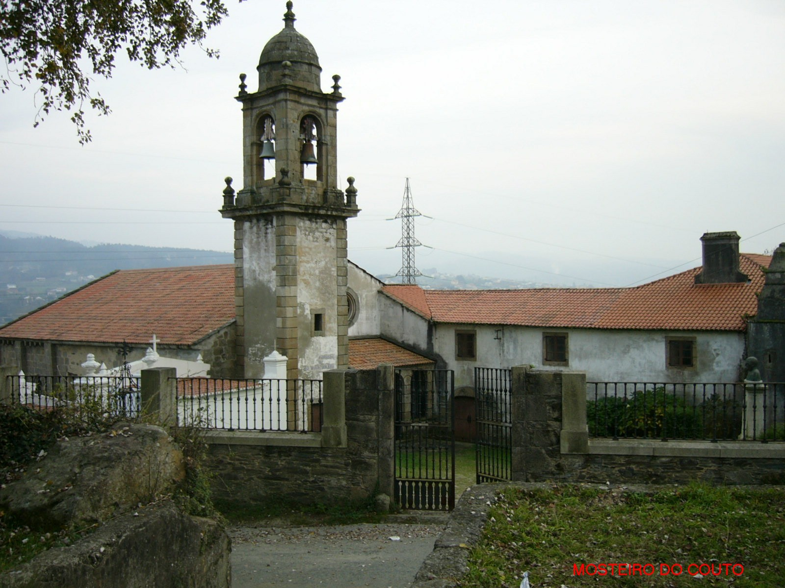 Mosteiro de San Martiño de Xuvia (O Couto) Categoría:Imaxes de Narón